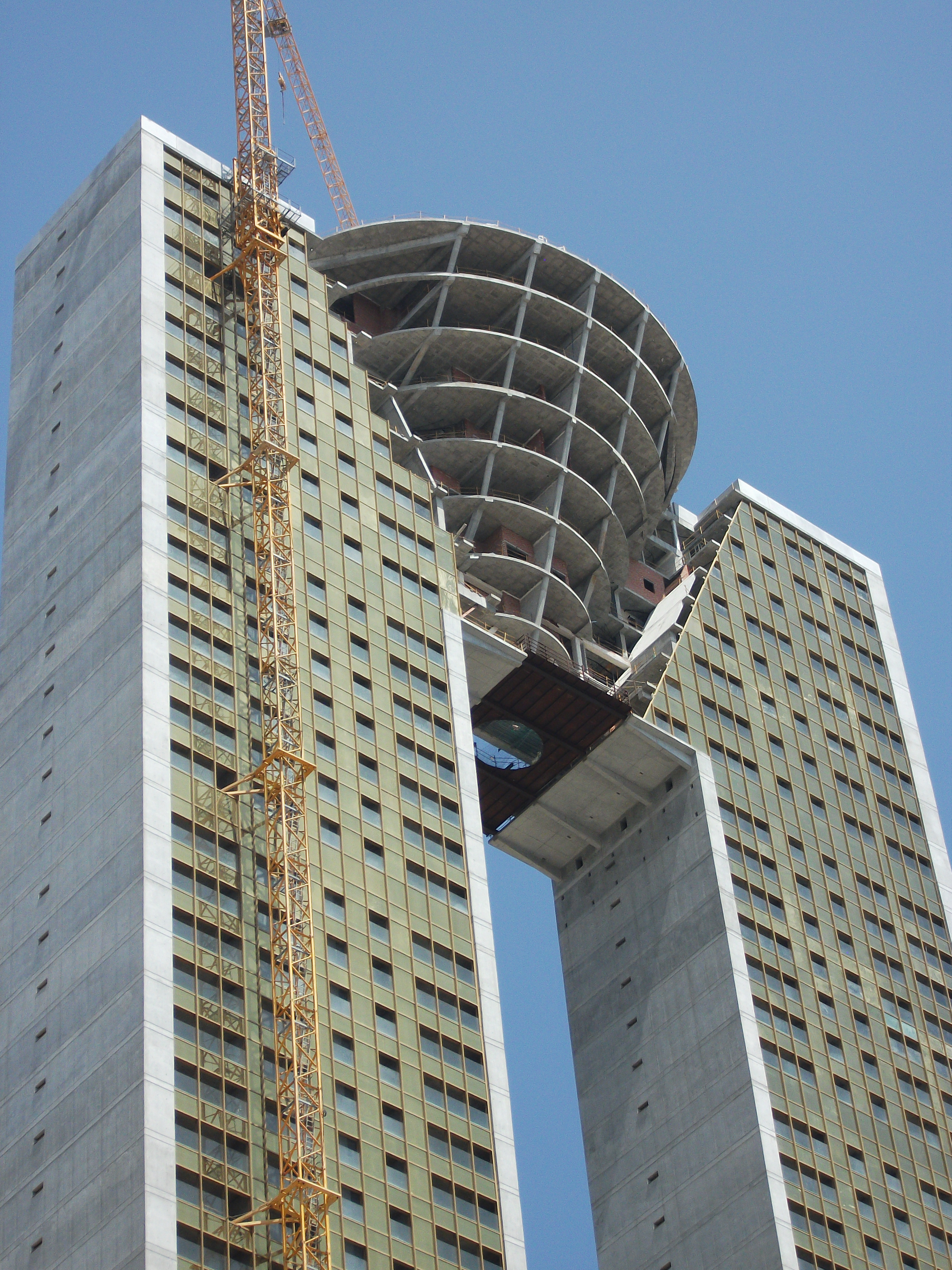 Edificio In Tempo, Benidorm, Alicante (España)